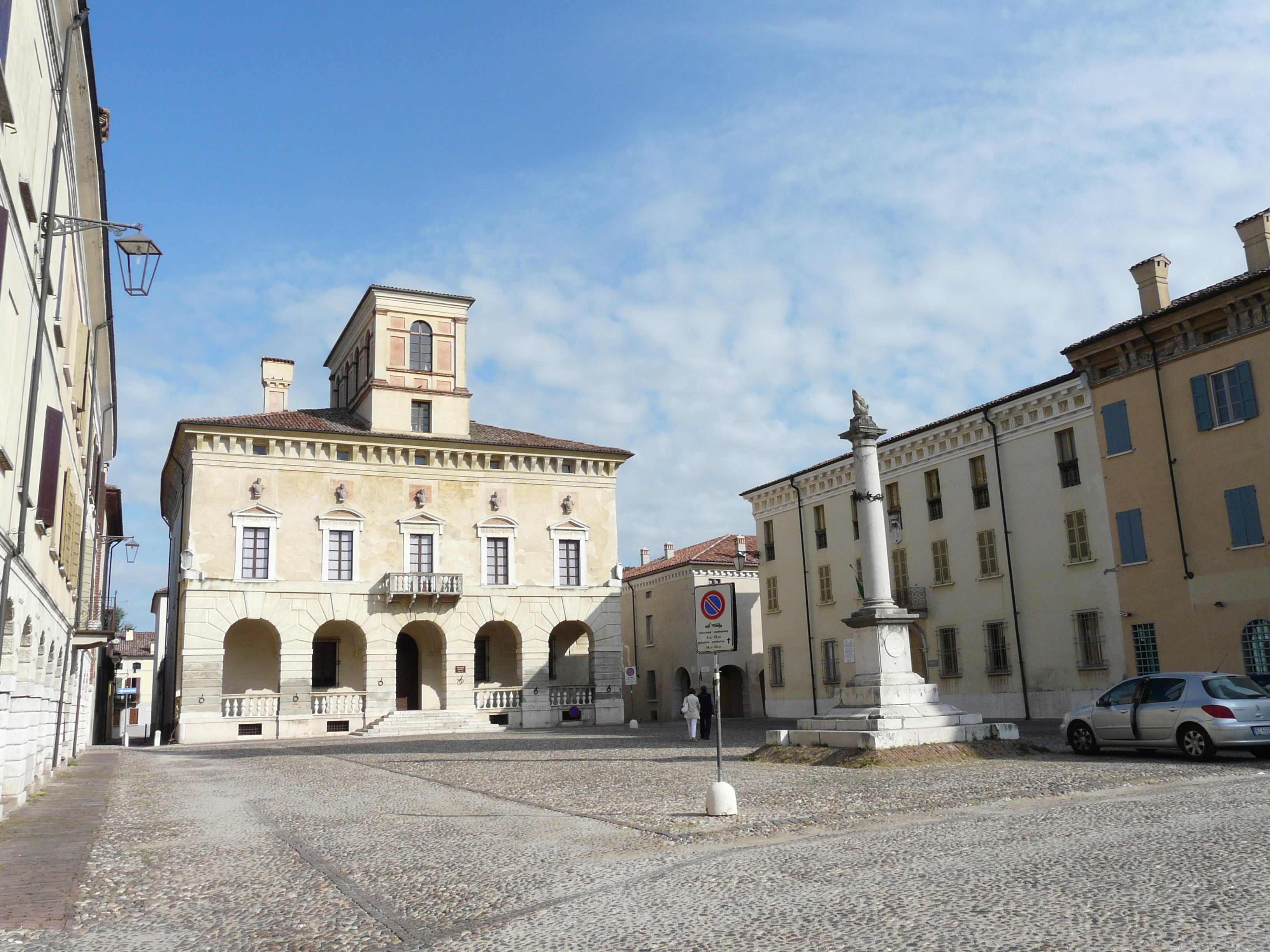 Piazza Ducale, Sabbioneta, Lombardia, Italia